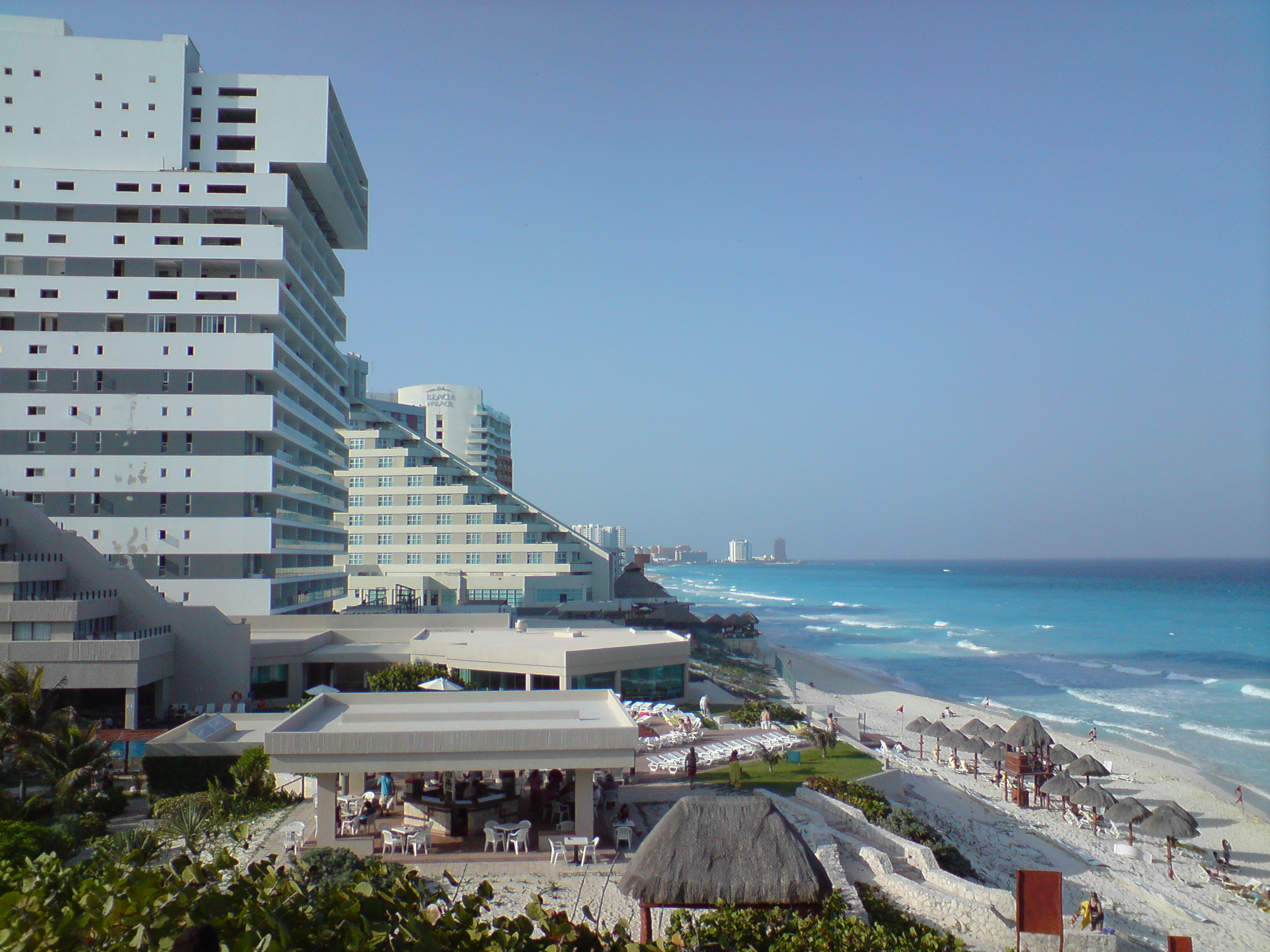 playas de Cancún, km 12